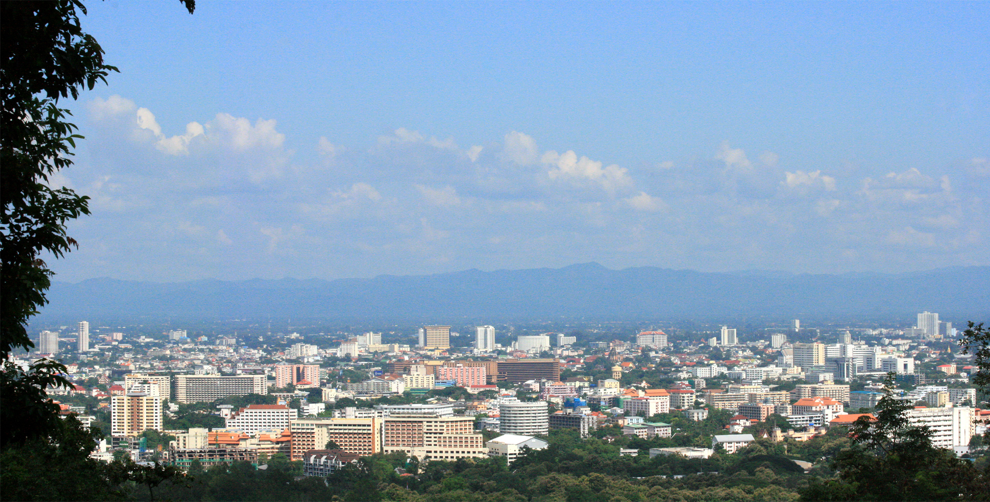 ตัวเมืองเชียงใหม่ ถ่ายจากน้ำตกวังบัวบาน